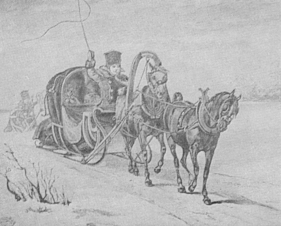 Уладзіслаў Дмахоўскі. У Вільню на карнавал